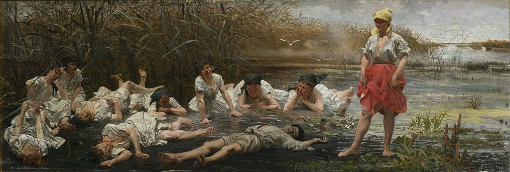 Załaskotany (cykl Rusałki). Olej na płótnie. 38 x 109,5 cm. Muzeum Uniwersytetu Jagiellońskiego w Krakowie.